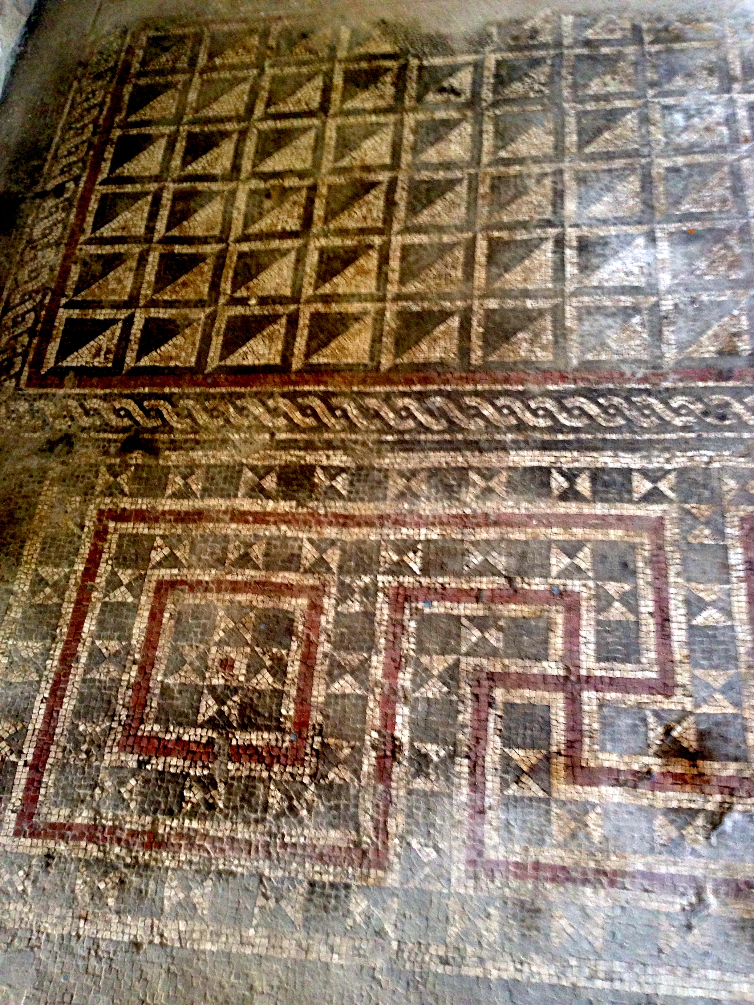 Villa romana di Cottanello . Pavimentazione: mosaico a cassettone e a meandro di svastiche.